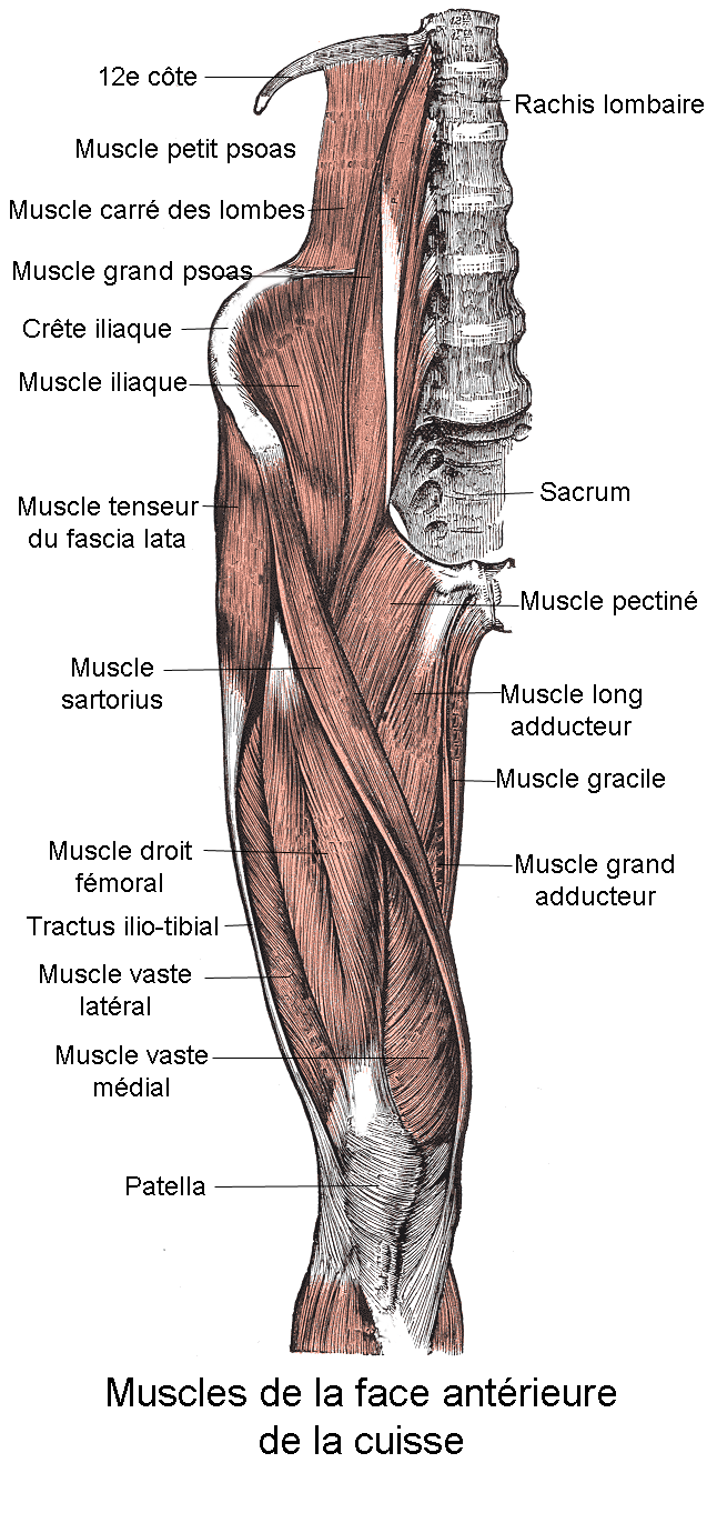 Muscles de la face antyérieure de la cuisse. Anatomie humaine